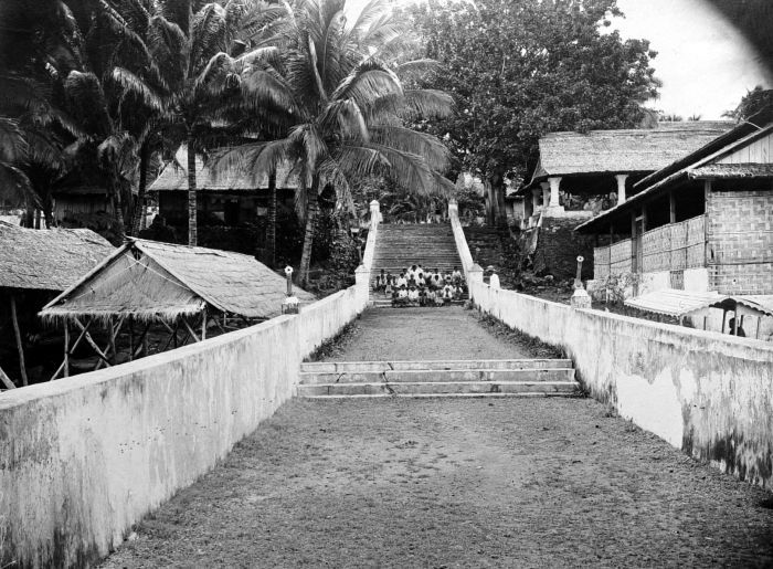 Repronegatief. Groepsportret in een straat op een trap, Soa Sioe, Tidore